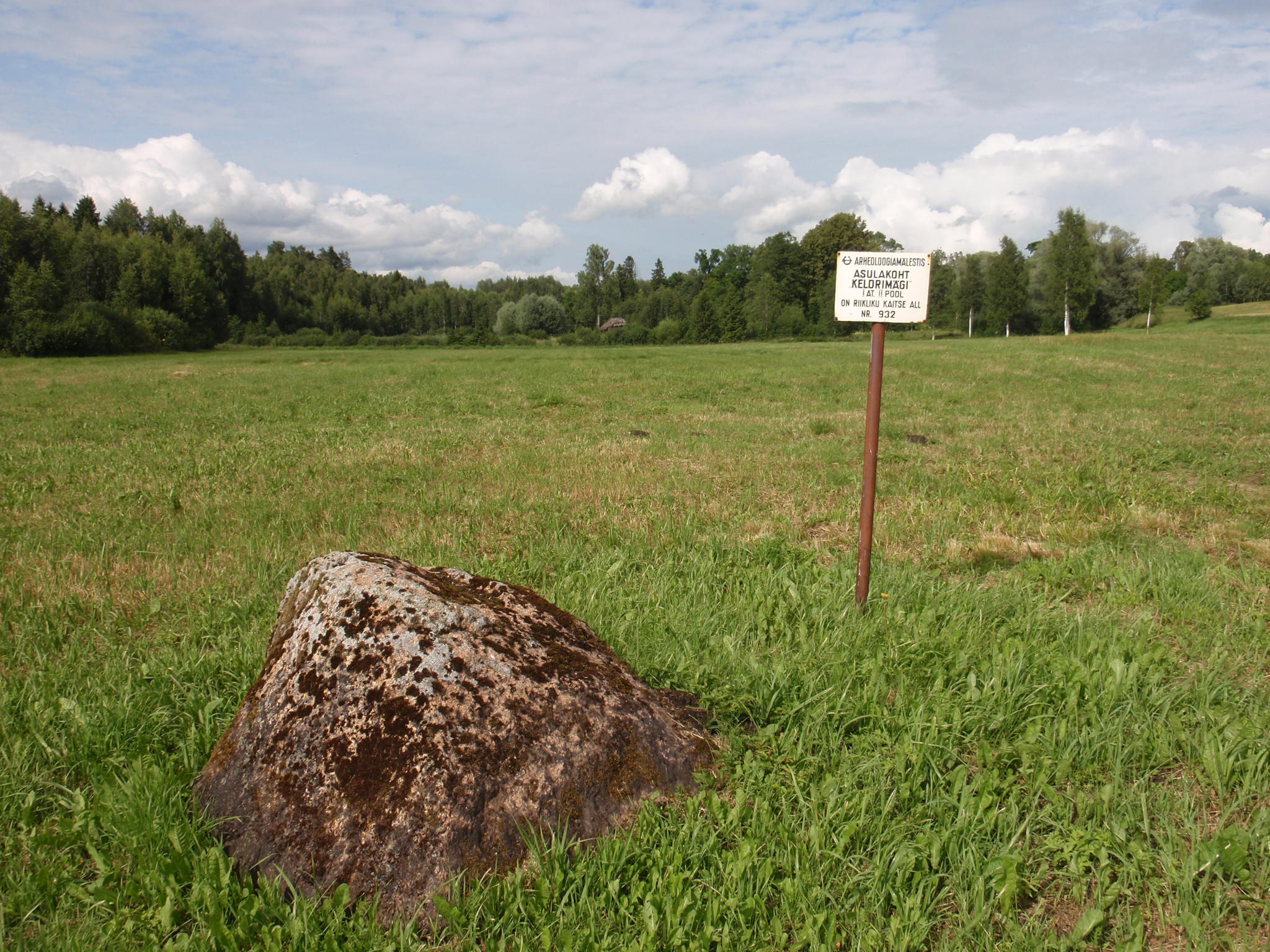 Asulakoht "Keldrimägi"